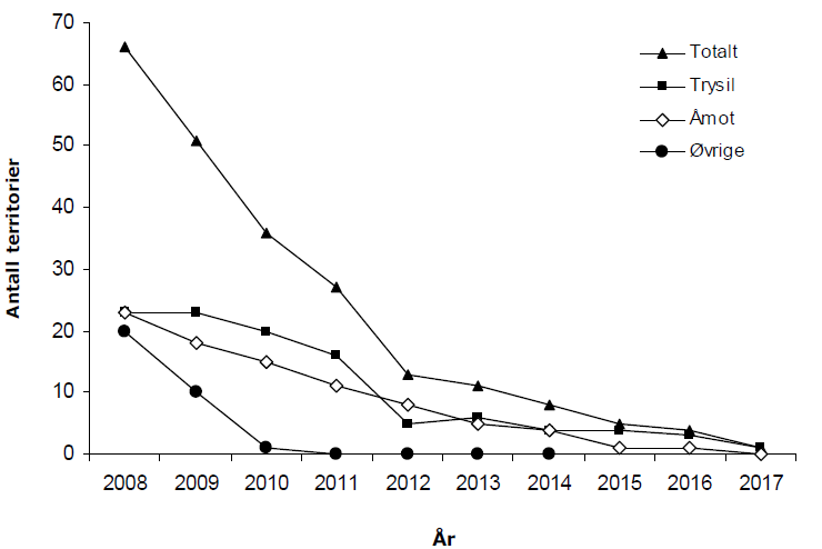 Bestandsutvikling for vierspurv (Emberiza rustica) i Hedmark i perioden 2008-2017